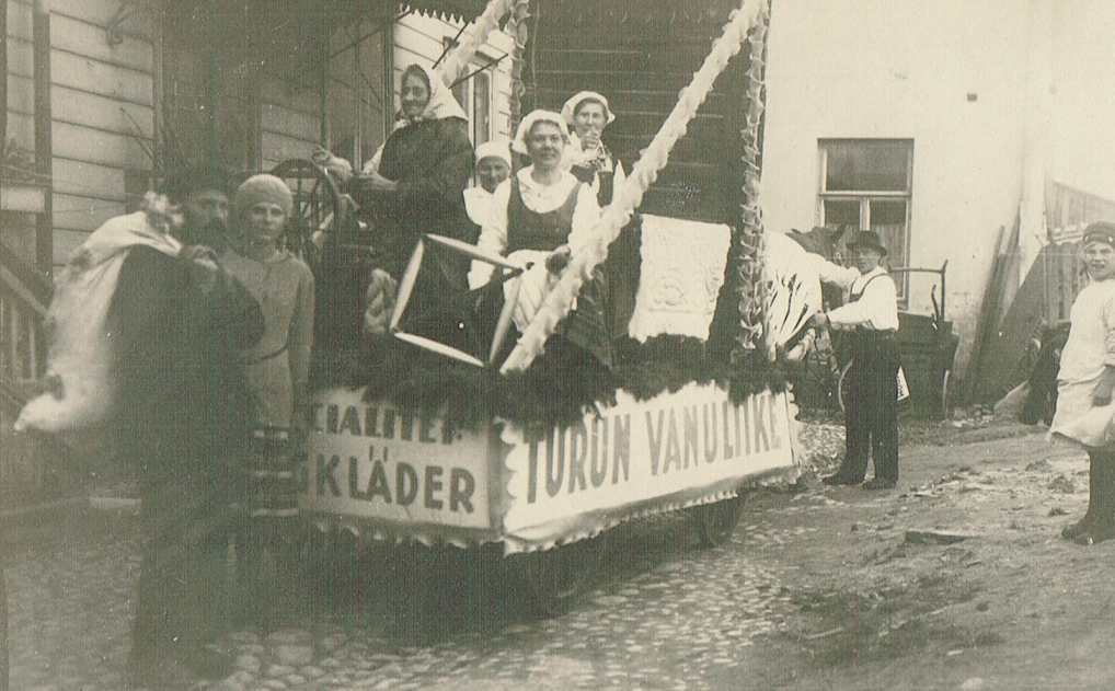 Turun Vanu 1926